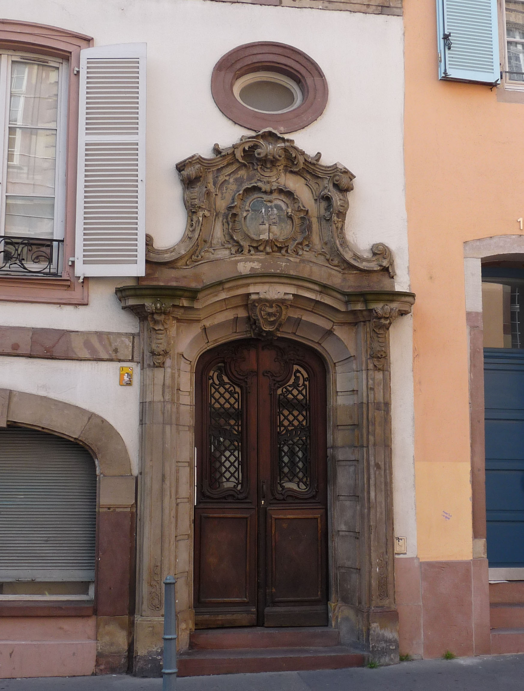 Maison de Strasbourg (12, rue de la Râpe) où Cagliostro vécut de 1780 à 1783, dite "Maison de Cagliostro". Portail rococo.